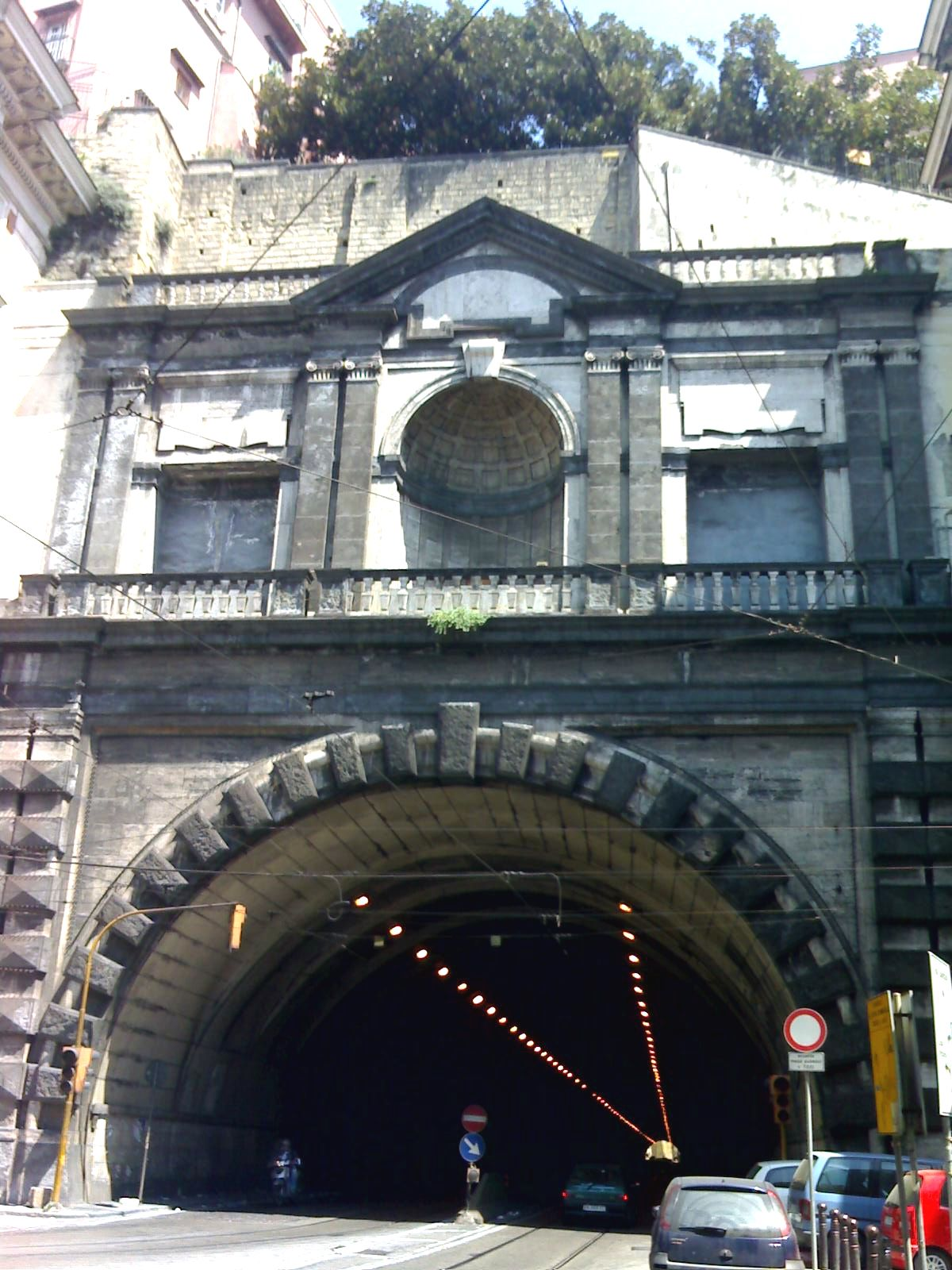 Facciata della Galleria della Vittoria (Piazza Vittoria, Napoli).